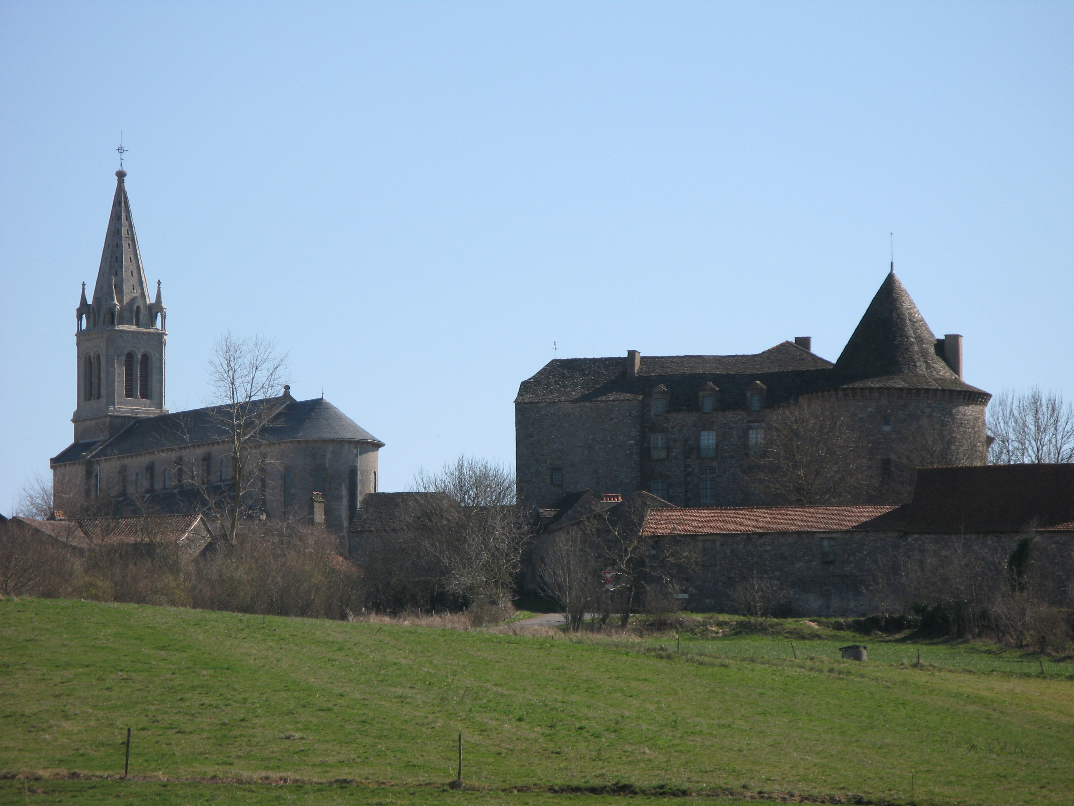 Église Sainte-Anne et château de Sanvensa. Petit village aveyronnais